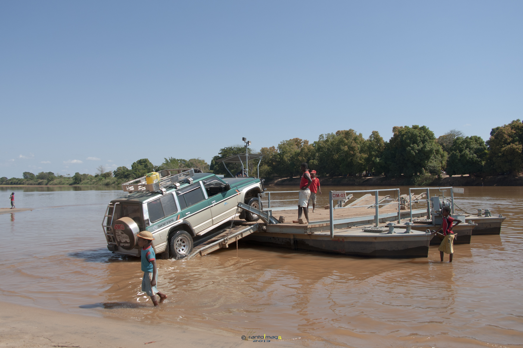 Brug bij Bekopaka